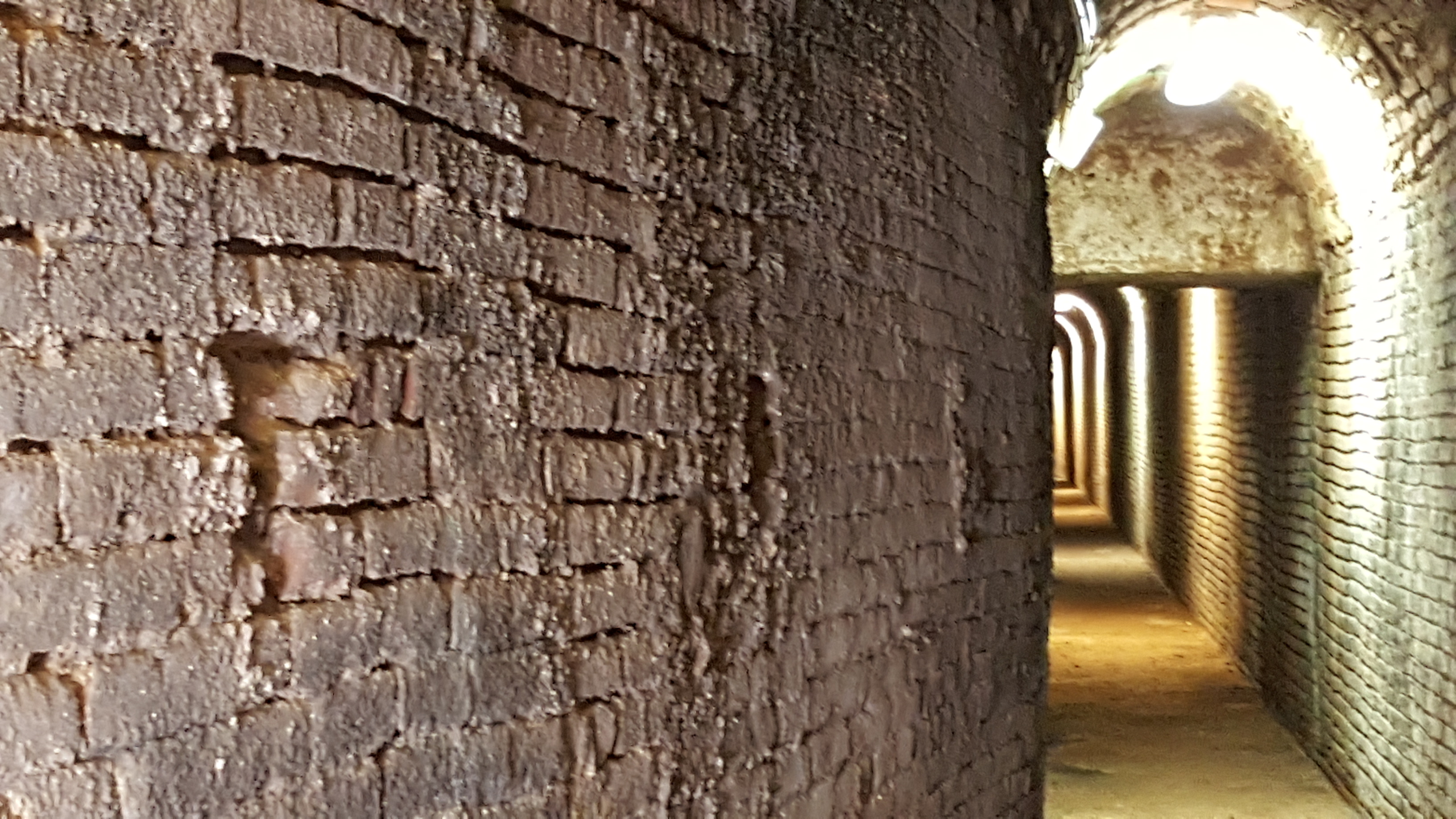 L'escola Industrial està ubicada a la fàbrica Batlló, on hi van treballar més de 2000 persones, aquest túnel connectava les calderes de la filatura amb la xemeneia de la fàbrica.